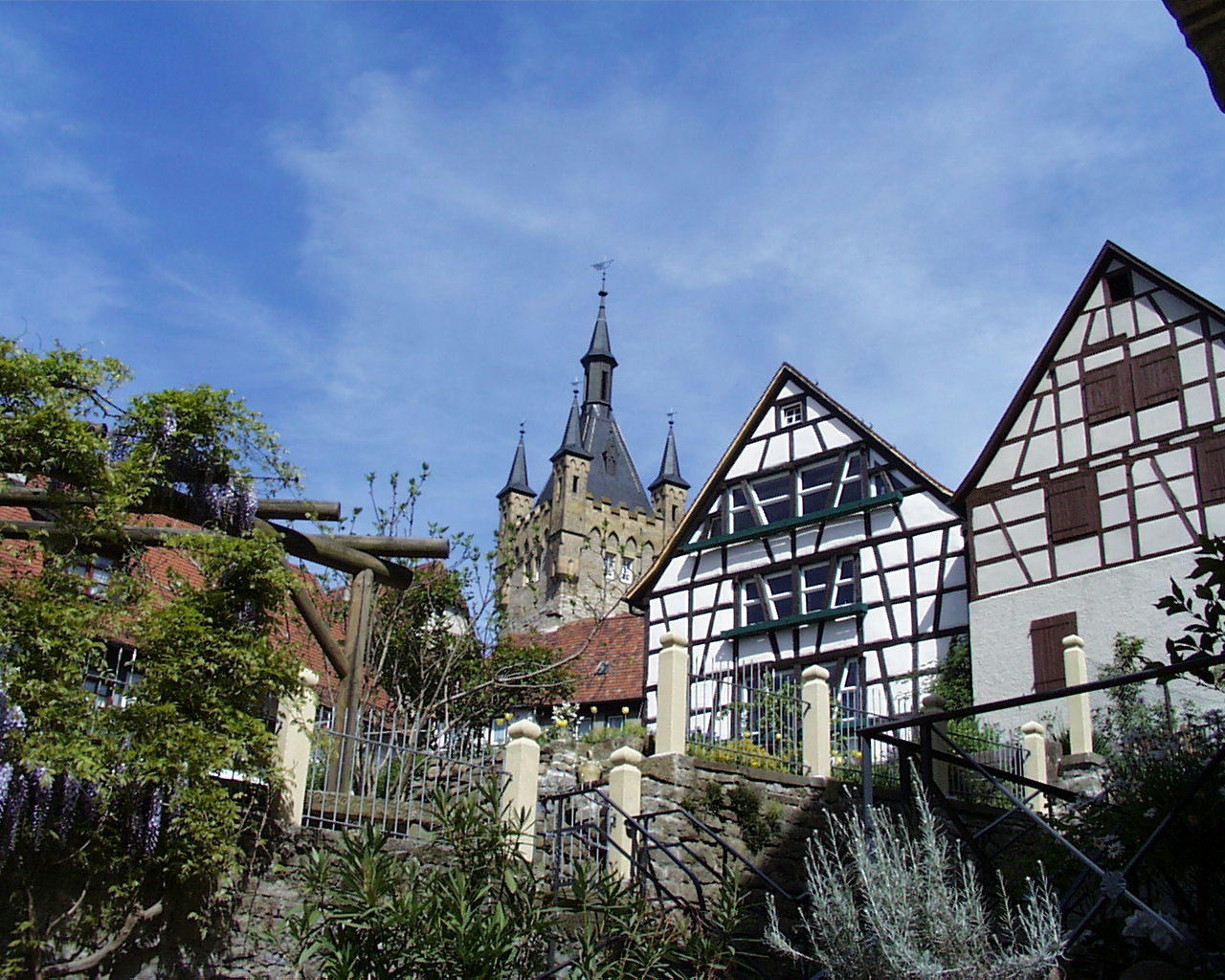 Bilder aus Bad Wimpfen